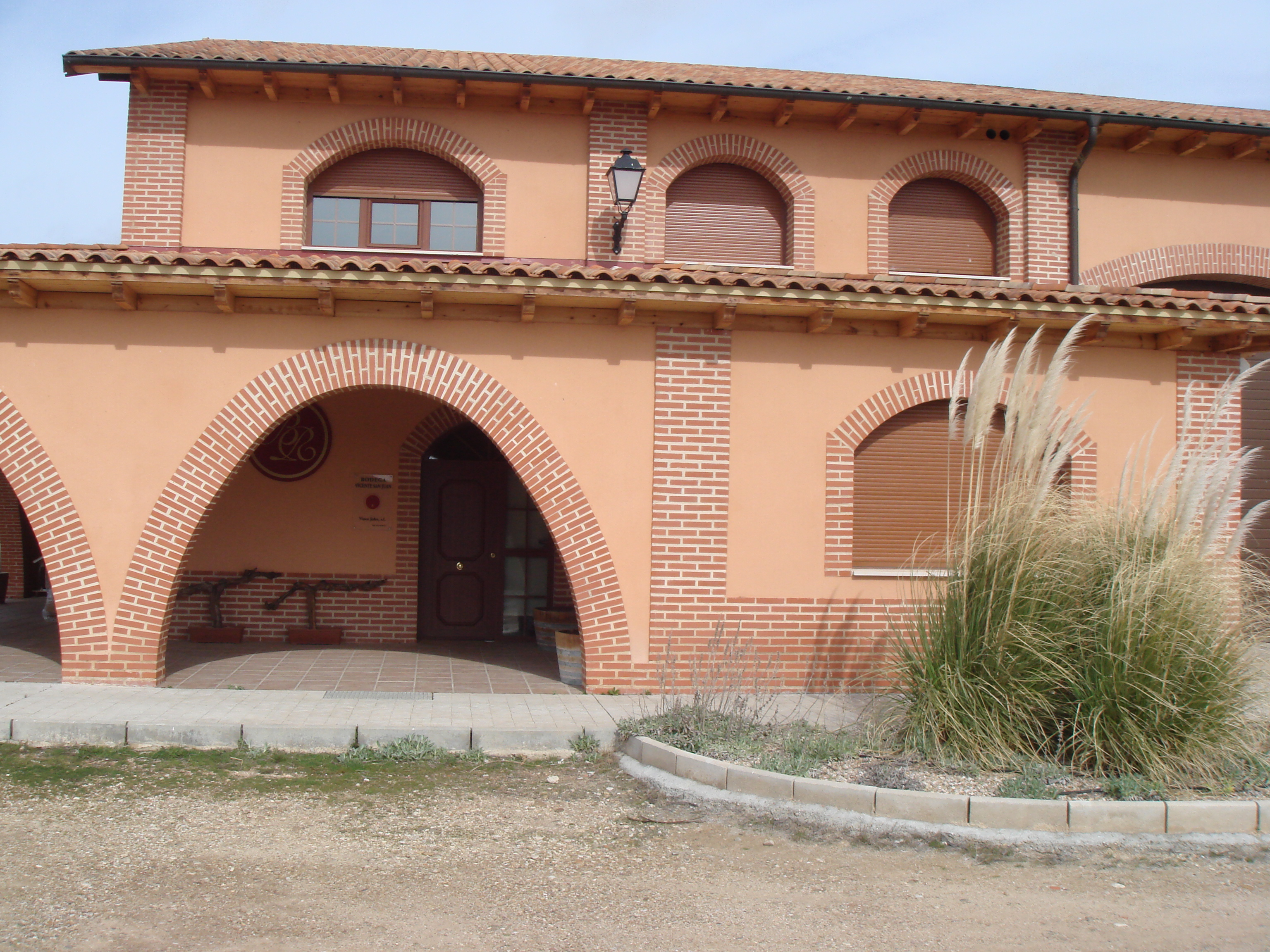 Fachada bodega Vince John dentro del término de San artín de Rubiales